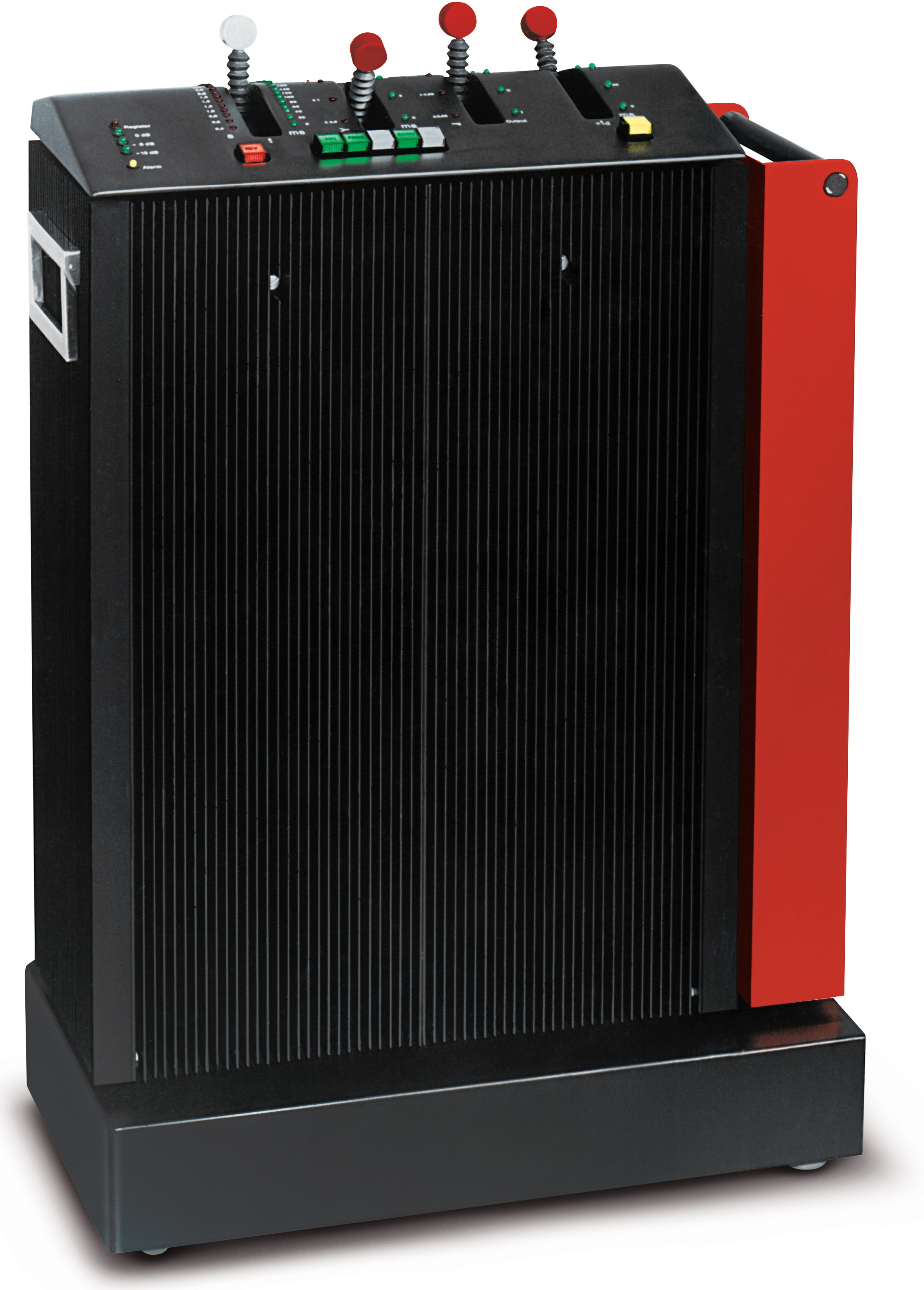 mobiles Hallgerät EMT 250 Ich, Peter Bermes, geb. 02.04.1944, Neunkirchen/Siegkreis, Dipl. Industrie Designer, Basler Strasse 20, 79189 Bad Krozingen, bin nachweislich sowohl für das Design des EMT 250 im Jahre 1994 verantwortlich (belegbar durch signierte und gestempelte Original Transparentzeichnungen aus meinem persönlichen Besitz) als auch Fotograf, Inhaber der Negative und Copyright-Inhaber des beigefügten Fotos. Auf Anfrage kann ich diese Angaben jederzeit belegen. Ich bitte Sie freundlich, mein Foto als Ergänzung zum Textbeitrag EMT 250 (editiert von Dr. Jörg Bockow von der Uni Münster) auf der Wikipedia Seite Elektromesstechnik Wilhelm Franz zu veröffentlichen. MfG Peter Michael Mathias Bermes Das Foto zeigt den ersten Prototyp des 1976 von mir, Peter Bermes, Dipl. Industrie Designer, geb. 02.04.1944, in Neunkirchen (Sieg), persönlich, für die Firma EMT-VgmbH, Kippenheim/Lahr gestalteten Hallgerätes EMT250. Das gesamte Gerätedesign inkl. Interface & Pultform, Bedienhebel, sowie das Farbschema Schwarz/Rot stammt nachweislich und ausschliesslich von mir und kann ggf. jederzeit durch Original-Transparentzeichnungen belegt werden, die in meinem Besitz sind. Das Hallgerät EMT 250 ist in enger Zusammenarbeit mit dem damaligen Geschäftsführer Erich Vogl und dem technischen Direktor Karl Otto Bäder, sowie dem us-amerikanischen MIT-Professor Barry Blesser entstanden. Das Hallgerät EMT 250 gilt sowohl bezüglich dessen überragenden Sound-Qualitäten als auch aufgrund des iconografischen Erscheinungsbildes heute als legendär und wurde deshalb 2007 in die ewige Bestenliste der 'Tec Hall of Fame' aufgenommen. Allerdings fehlt dort bis heute der namentliche Hinweis auf meine verantwortliche Urheberschaft für das Design. Dies möchte ich mit Hilfe dieser Veröffentlichung auch dort offiziell korrigieren! MfG Peter Michael Mathias Bermes, Basler Strasse 20, 79189 Bad Krozingen, 18.02.2017